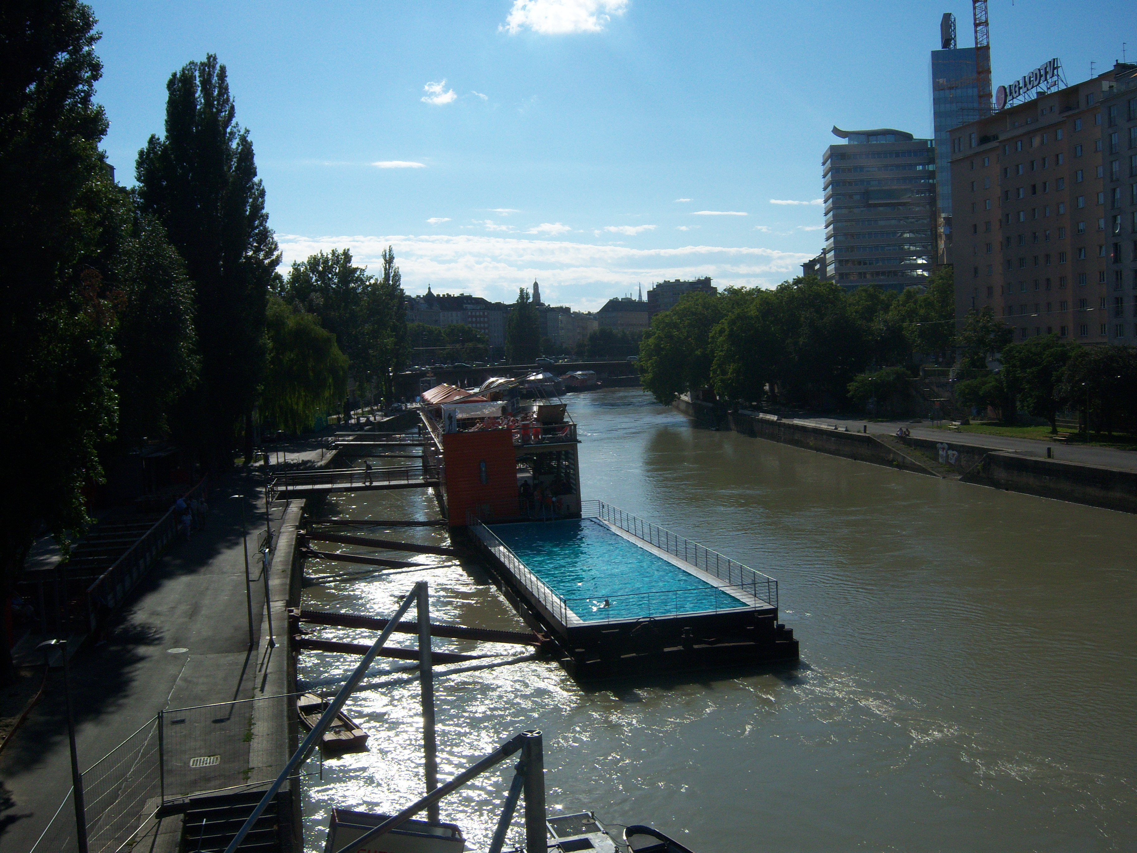 Badeschiff Wien im Donaukanal